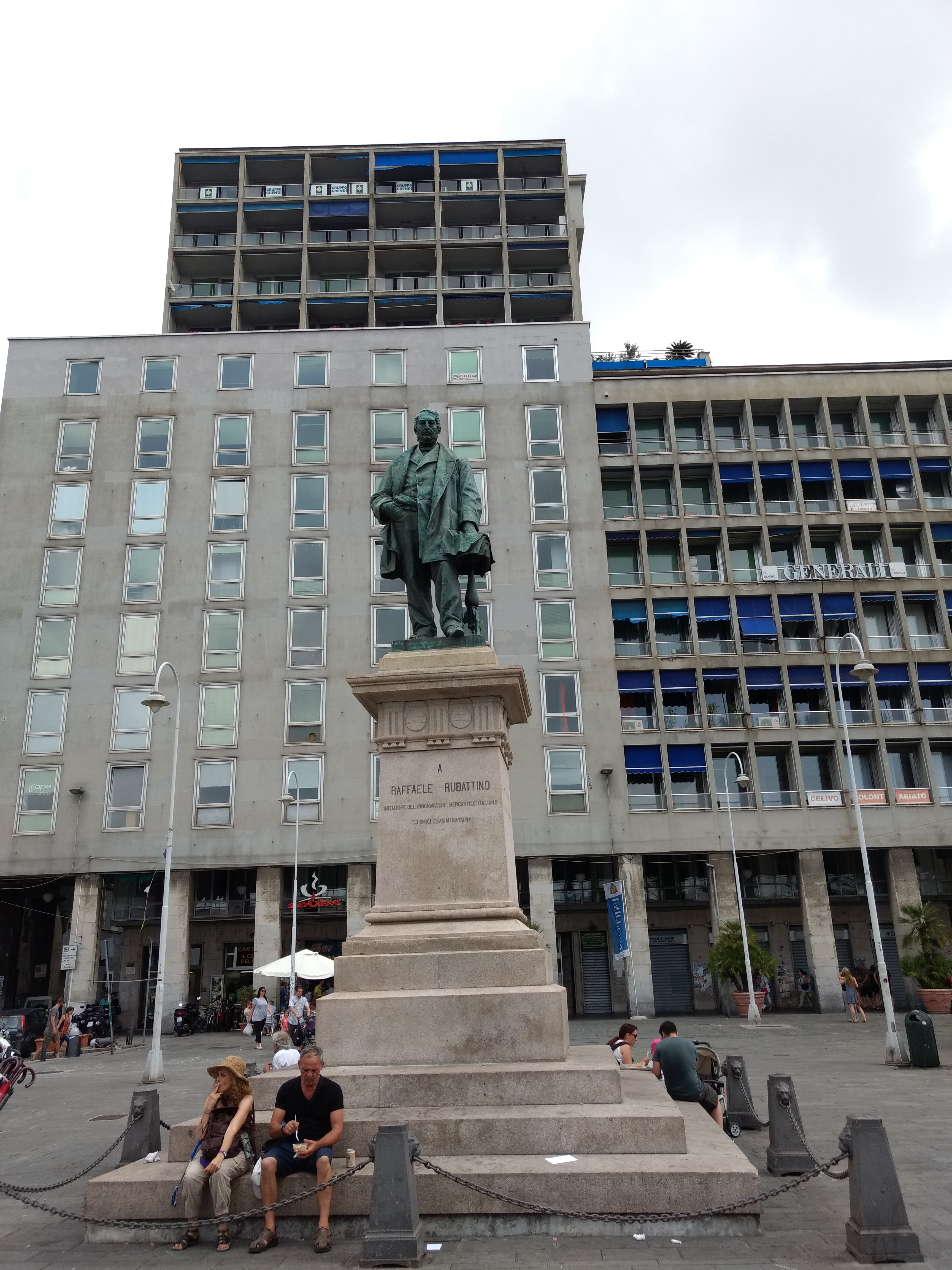 Raffaela Rubattino, Genova